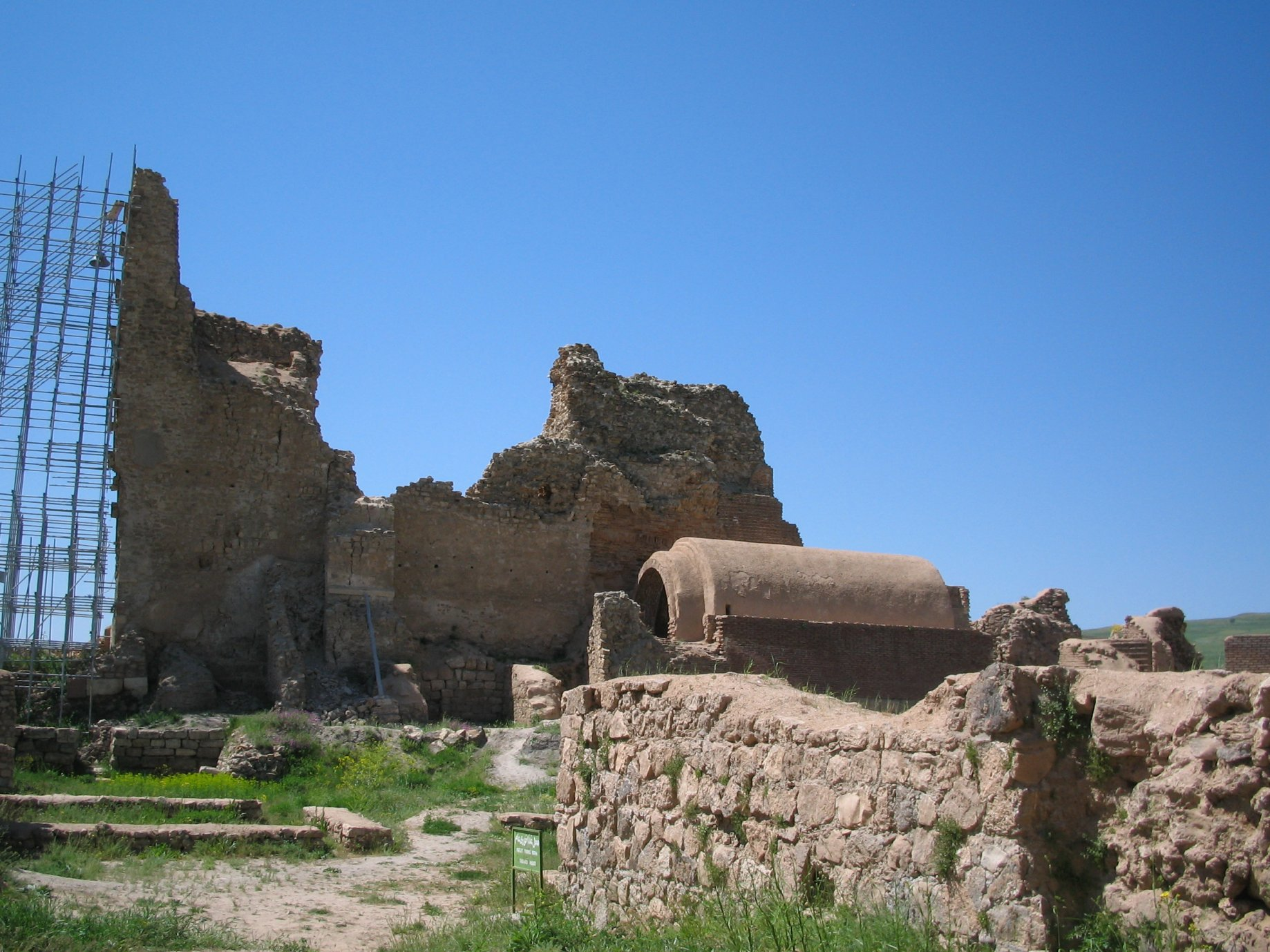 Takht e Soleiman, Takab, Iran